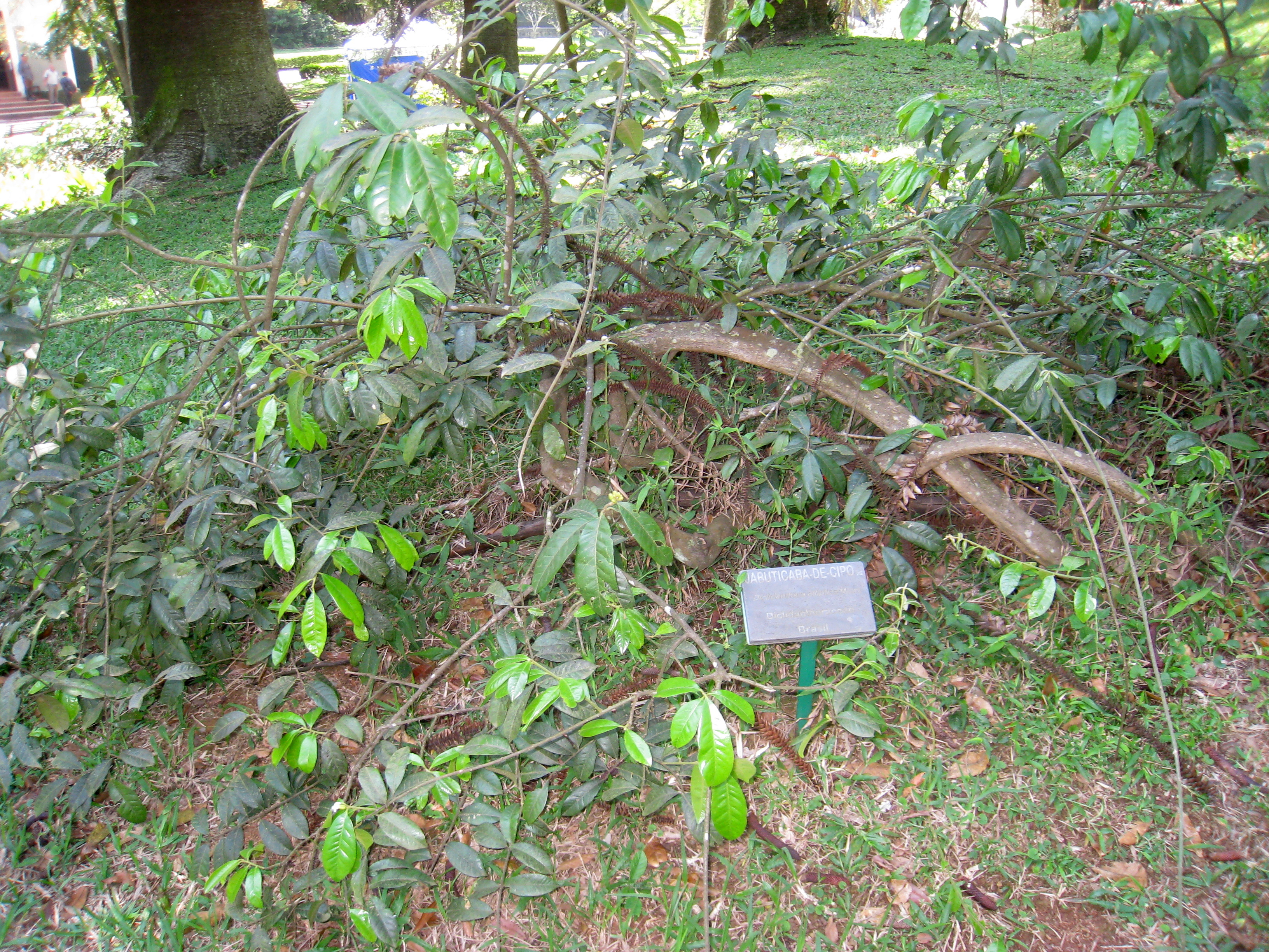 Diclidanthera elliptica in the Jardim Botânico de São Paulo, São Paulo City, SP, Brazil.